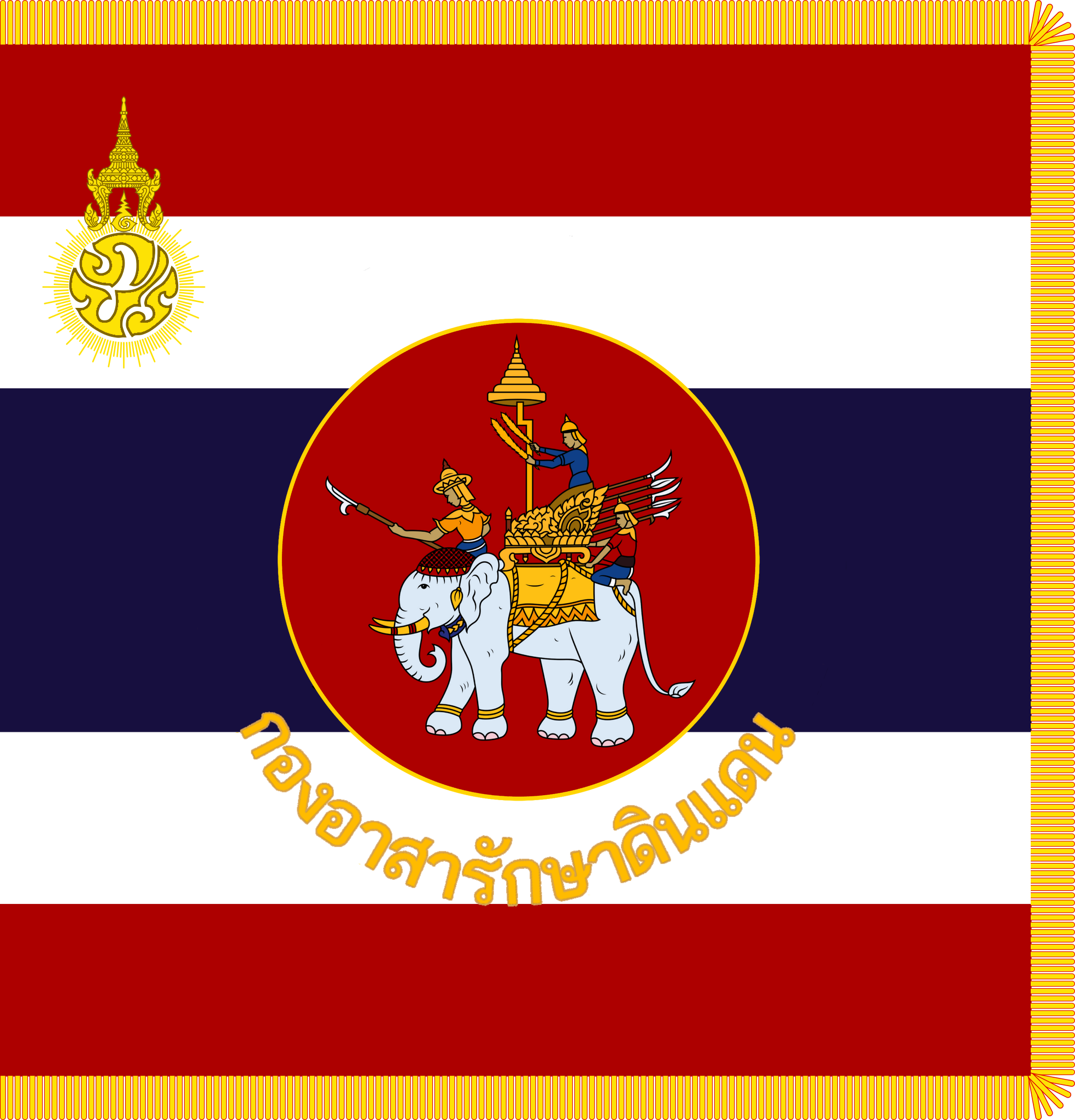 มาตรา ๓๕ ธงกองอาสารักษาดินแดน มีลักษณะและสีอย่างเดียวกับธงชาติ แต่ผืนธงเป็นรูปสี่เหลี่ยมจัตุรัส ขนาดกว้างด้านละ ๗๒ เซนติเมตร ด้านหน้าของผืนธงมุมบนด้านที่ติดกับคันธงมีรูปพระมหามงกุฎและเลขหมายประจำรัชกาลของพระมหากษัตริย์ที่พระราชทานเป็นตัวเลขไทยสีเหลือง ภายใต้พระมหามงกุฎมีพระปรมาภิไธยย่อเป็นสีทองขลิบริมสีเหลืองรัศมีสีทอง และที่ตรงกลางของผืนธงมีดวงกลมสีแดงขนาดเส้นผ่าศูนย์กลางยาว ๓๔ เซนติเมตร ขอบรอบวงกลมเป็นสีเหลือง มีรูปพระนเรศวรทรงช้างอยู่ภายในดวงกลมและมีความว่า “กองอาสารักษาดินแดน” ปักด้วยดิ้นทองเป็นแถวโค้งโอบใต้ดวงกลมนั้น ด้านหลังที่ตรงกลางของผืนธงมีรูปช่อชัยพฤกษ์และอุณาโลมอยู่ตรงกลางภายใต้พระมหามงกุฎ ปักด้วยดิ้นทอง ขอบธงด้านที่ติดกับคันธงเป็นสีแดง ด้านอื่นเป็นกรุยสีเหลือง